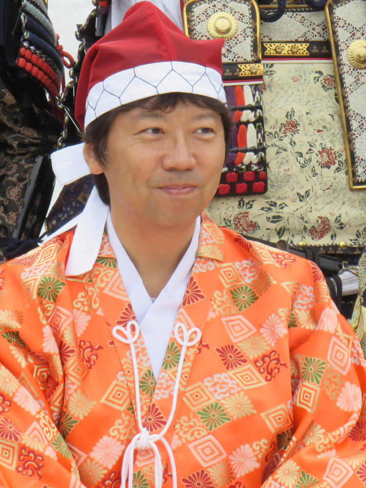 将棋棋士の杉本昌隆（令和元年年１１月、姫路市で行われた人間将棋にて）